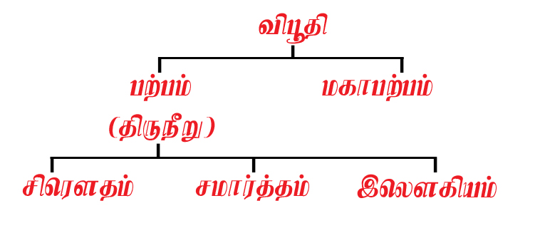 விபூதி கற்பம் வகைப்பாடு விளக்கப்படம்